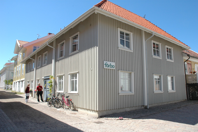 Bild på ett av Förbos hus på V Återvändsgatan 1